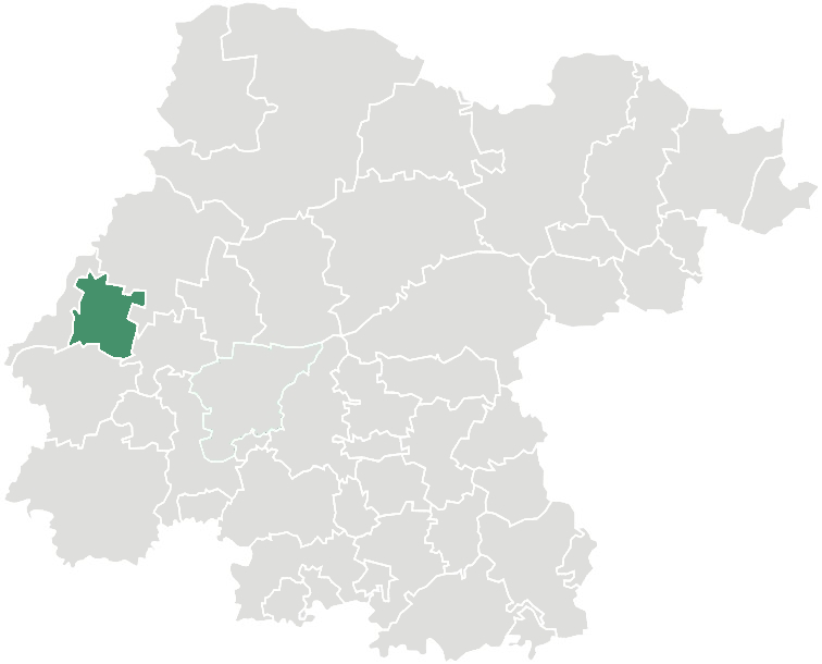 Ubicación del municipio de San Francisco del Rincón en el Estado de Guanajuato, México.